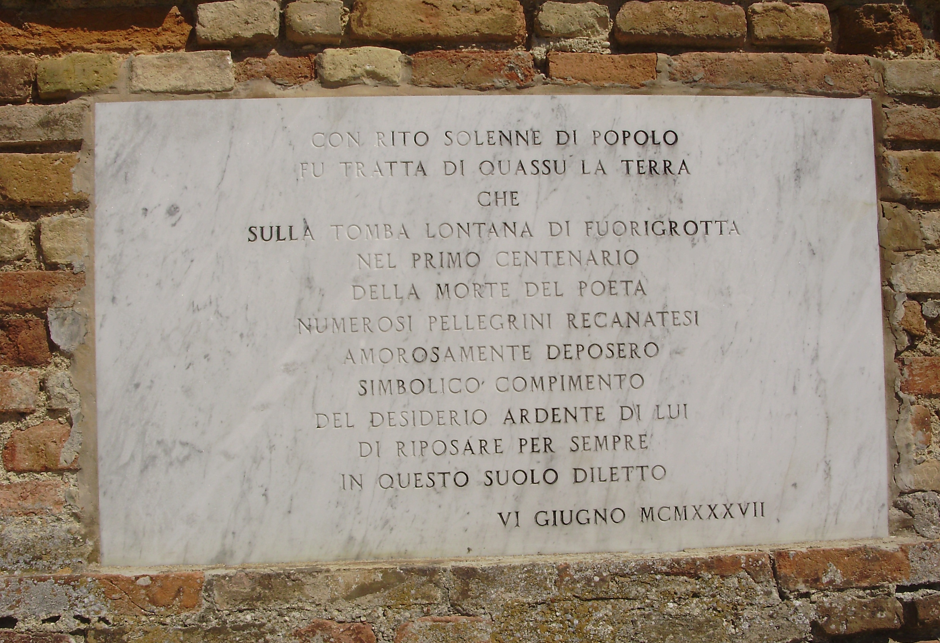 Lapide a memoria della terra recanatese portata sulla tomba di Leopardi a Piedigrotta